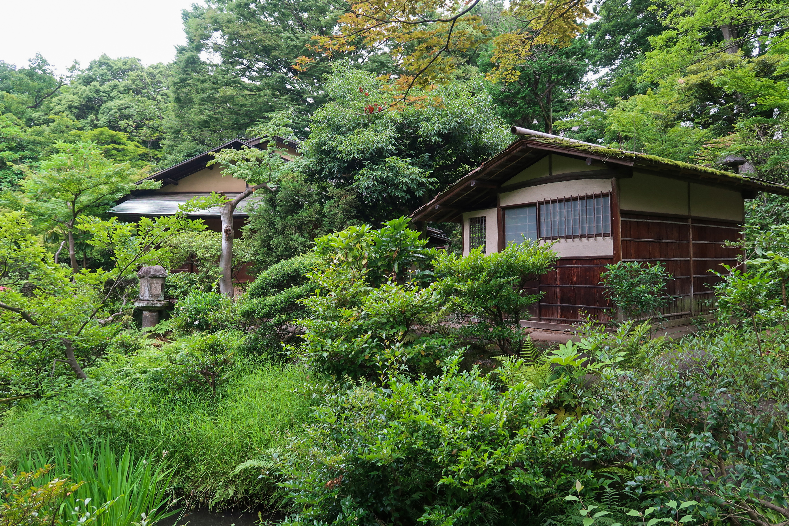 Nezu Museum